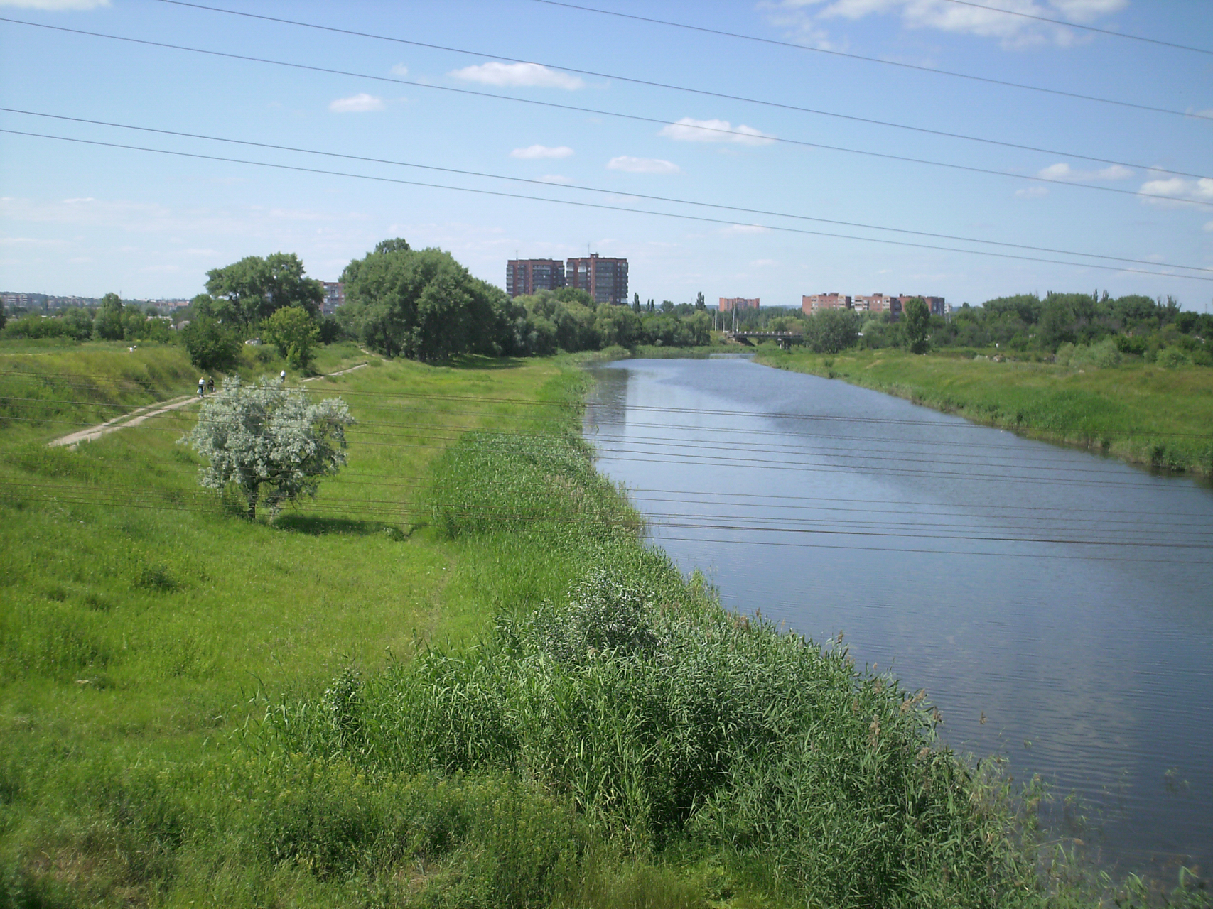 Старе річище Казенного Торця, м. Слов'янськ: вид із залізничного моста